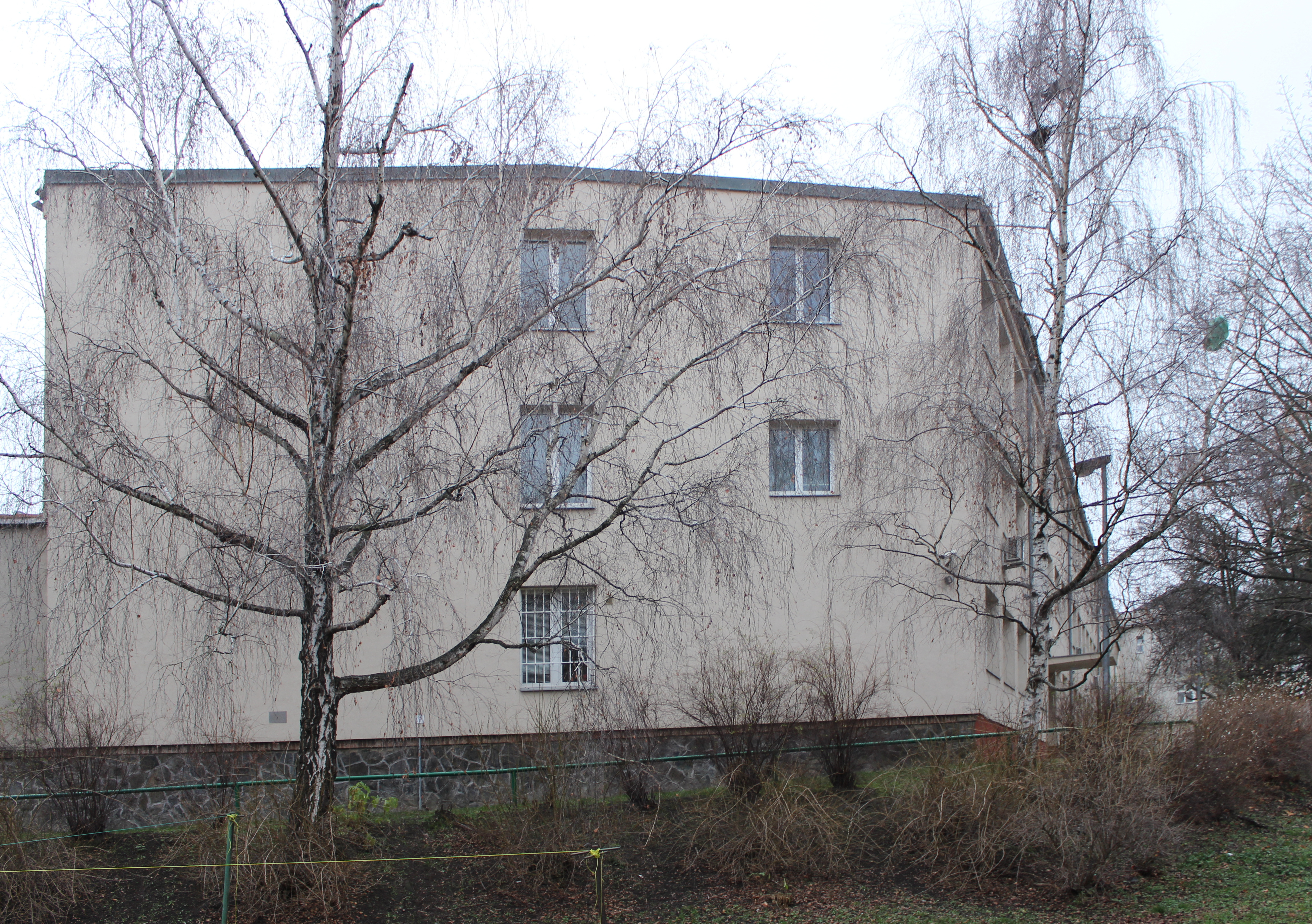 Objekt ředitelství Vězeňské služby České republiky.